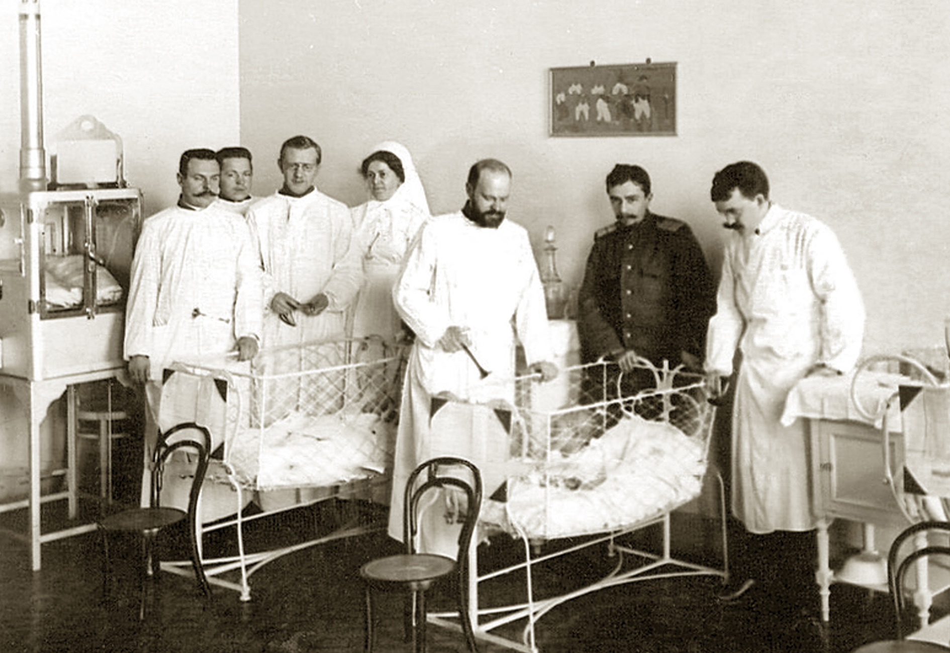 Ординарной профессор кафедры детских болезней ВМА А. Н. Шкарин в клинике со слушателями академии